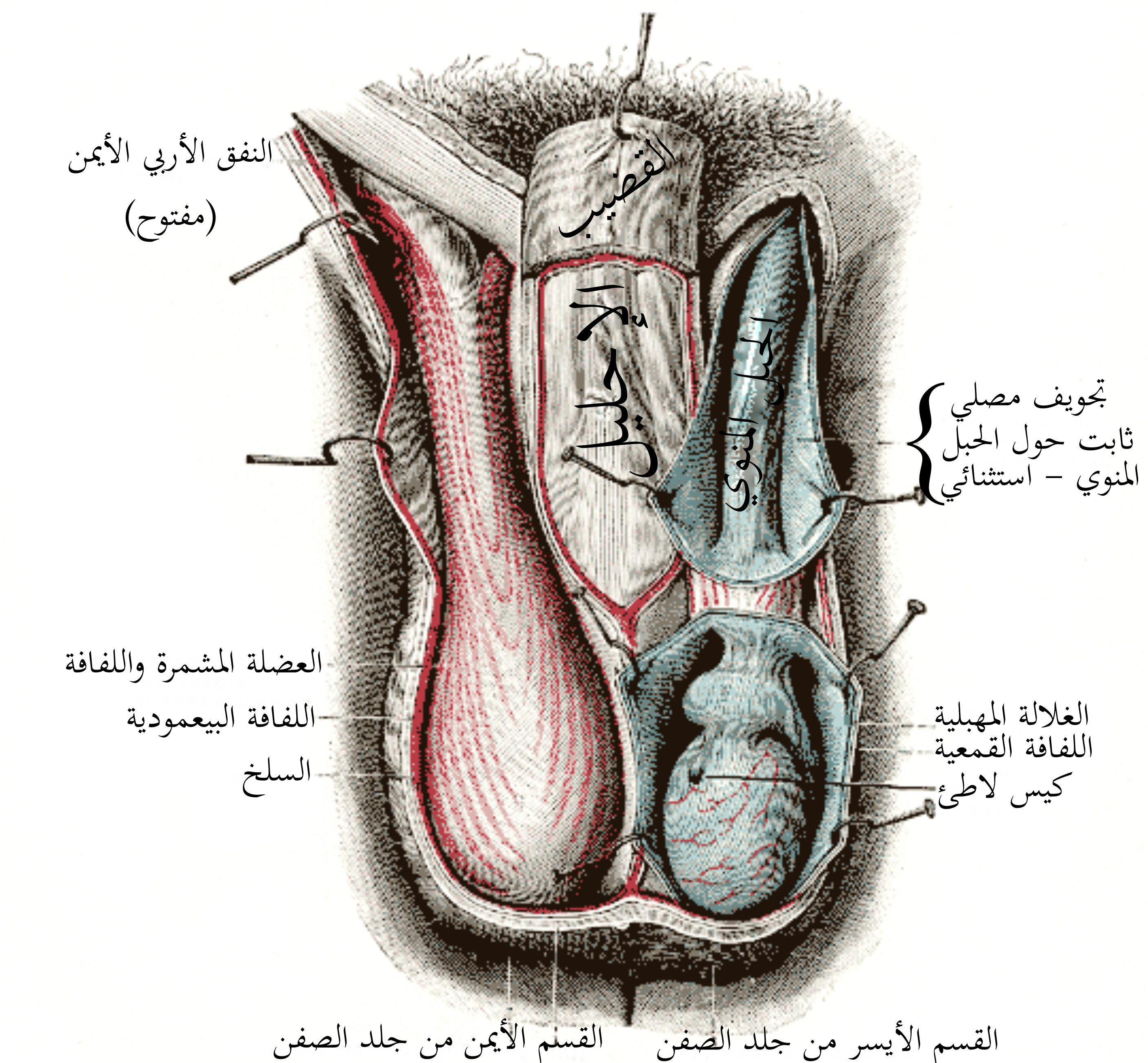 تشريح الصفن. يظهر يسارًا تجويف الغلالة المهبلية وقد فُتح؛ وعلى اليمن وحدها الطبقات المُرتقية على العضلات المُشمِّرة تبدو لِلناظر.